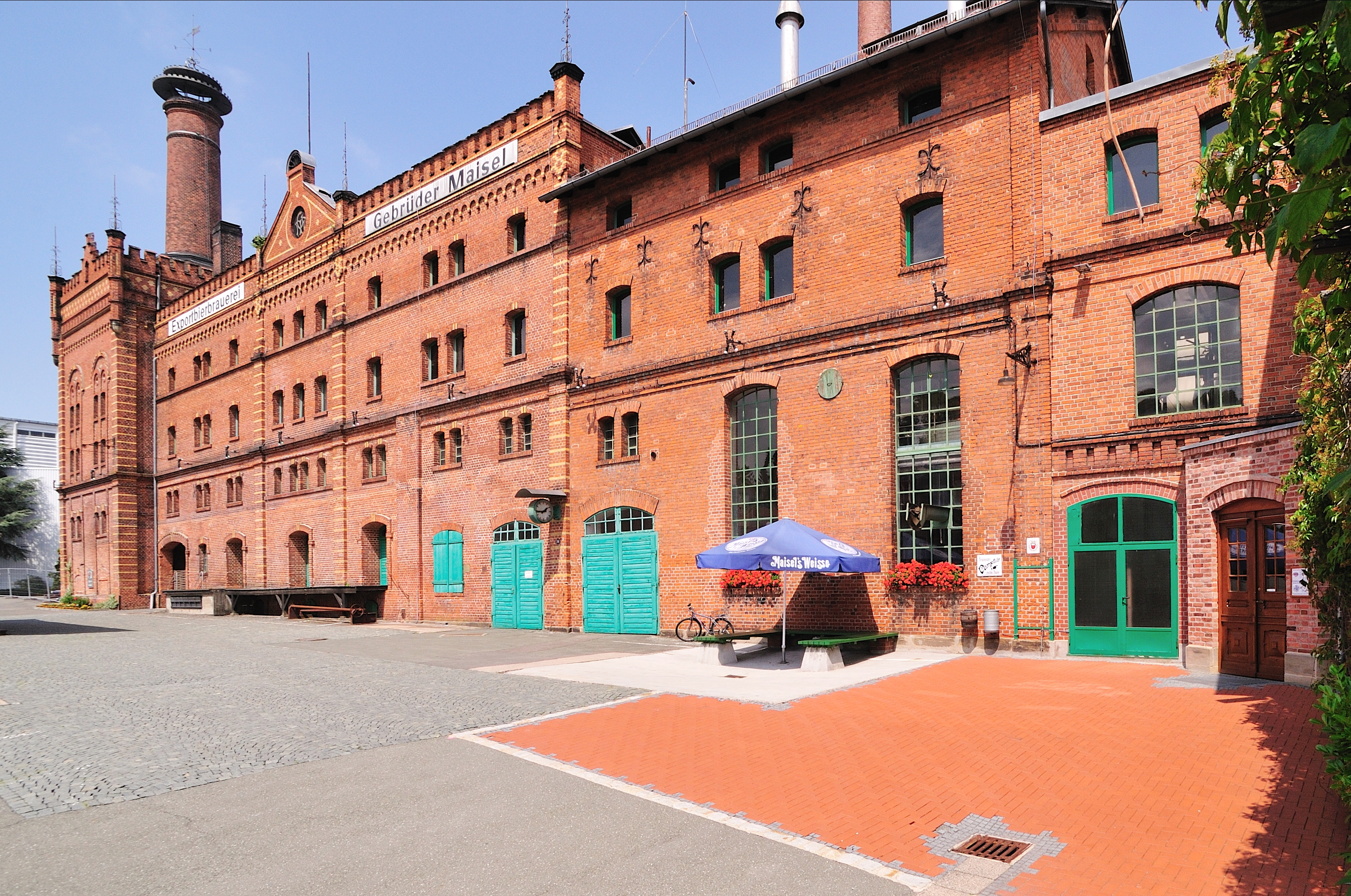 Ansicht der hsitorischen Brauerei sowie des Eingangs zum Brauereimusem